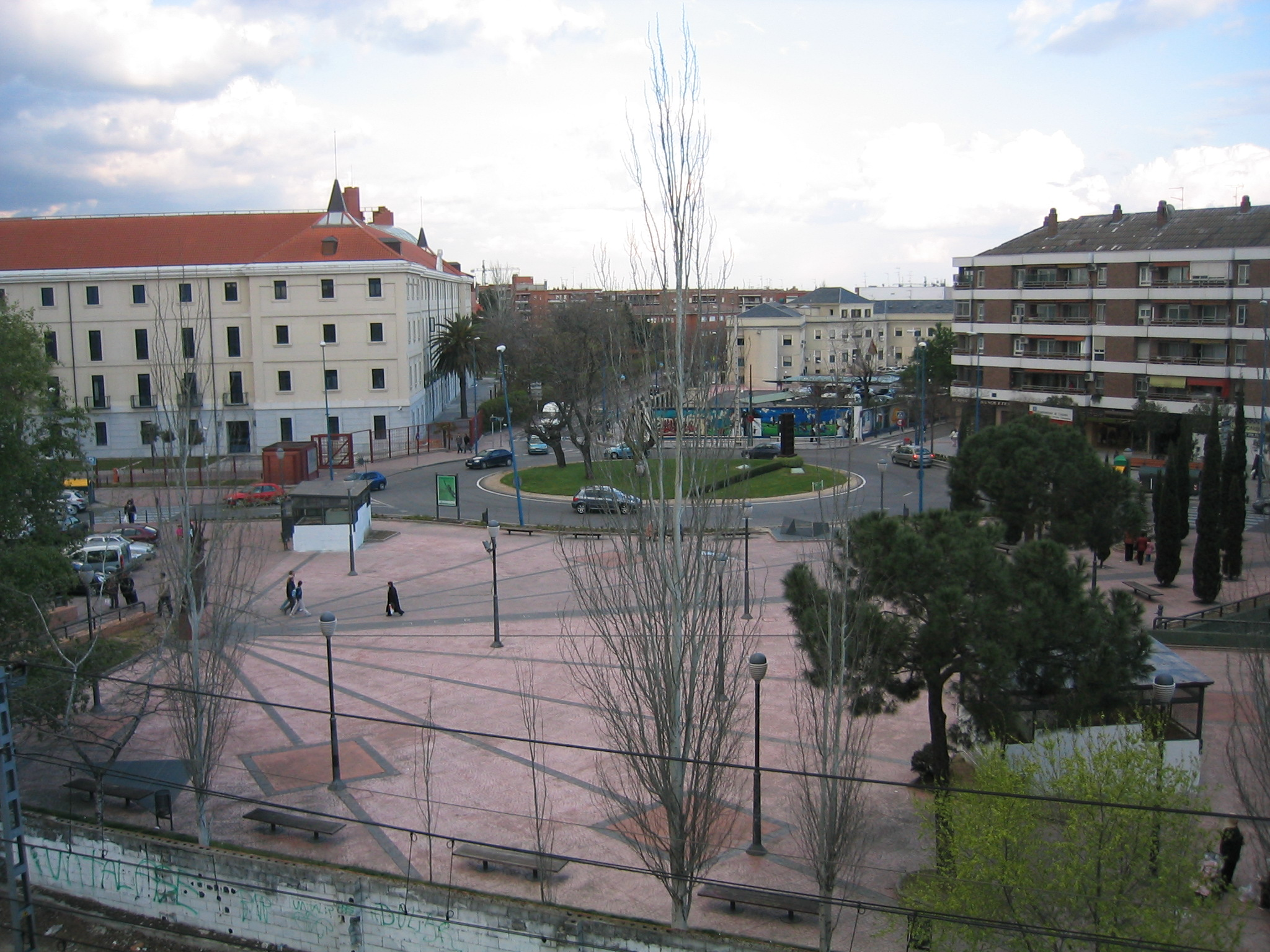 Edificio Sabatini de la Escuela Politécnica Superior de la Universidad Carlos III de Madrid (Leganés).